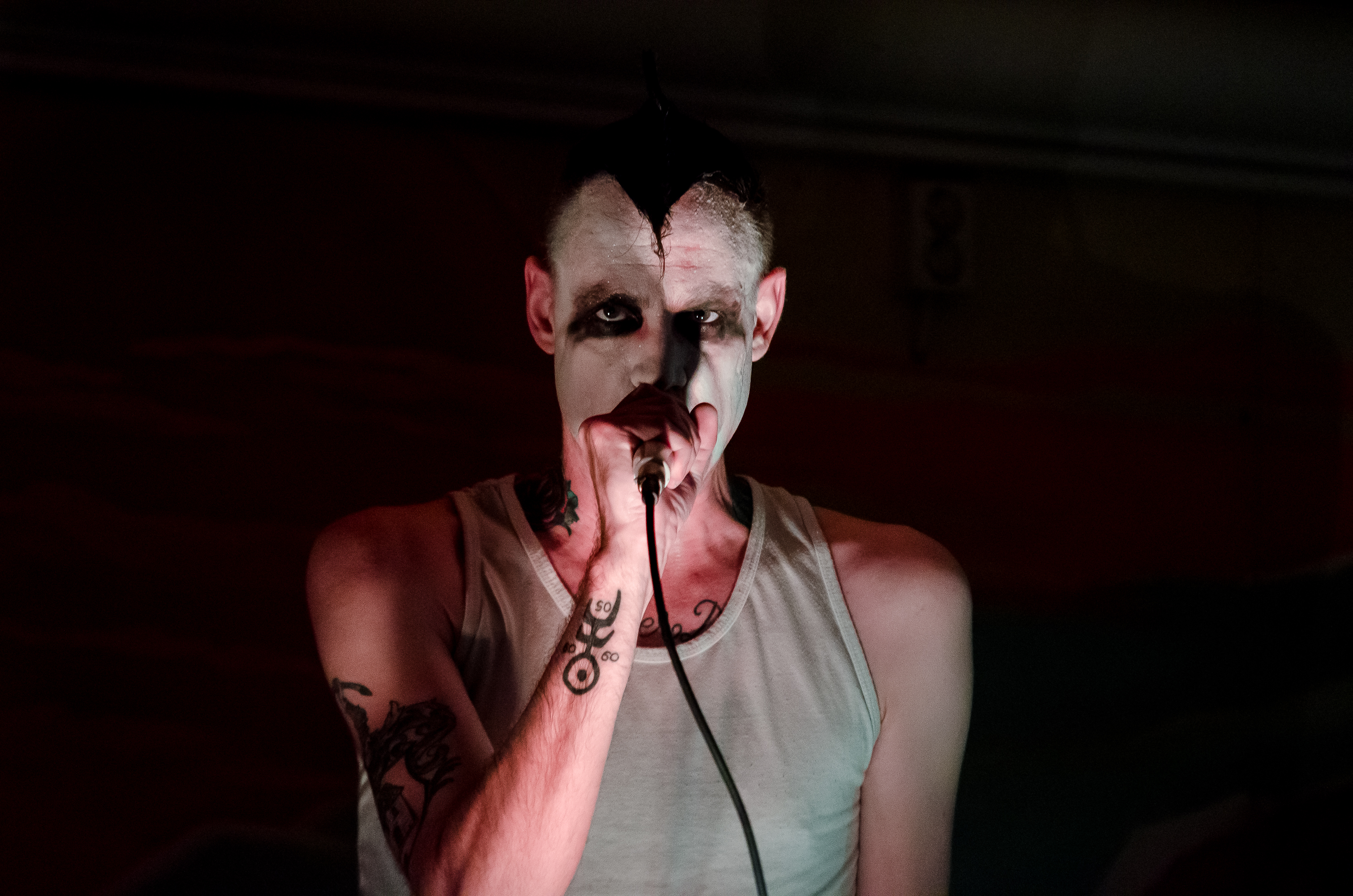 Henric de la Cour uppträder på Kalabaik på Tyrolen 2012.